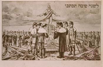 Jewish Soldiers Prayer WW1